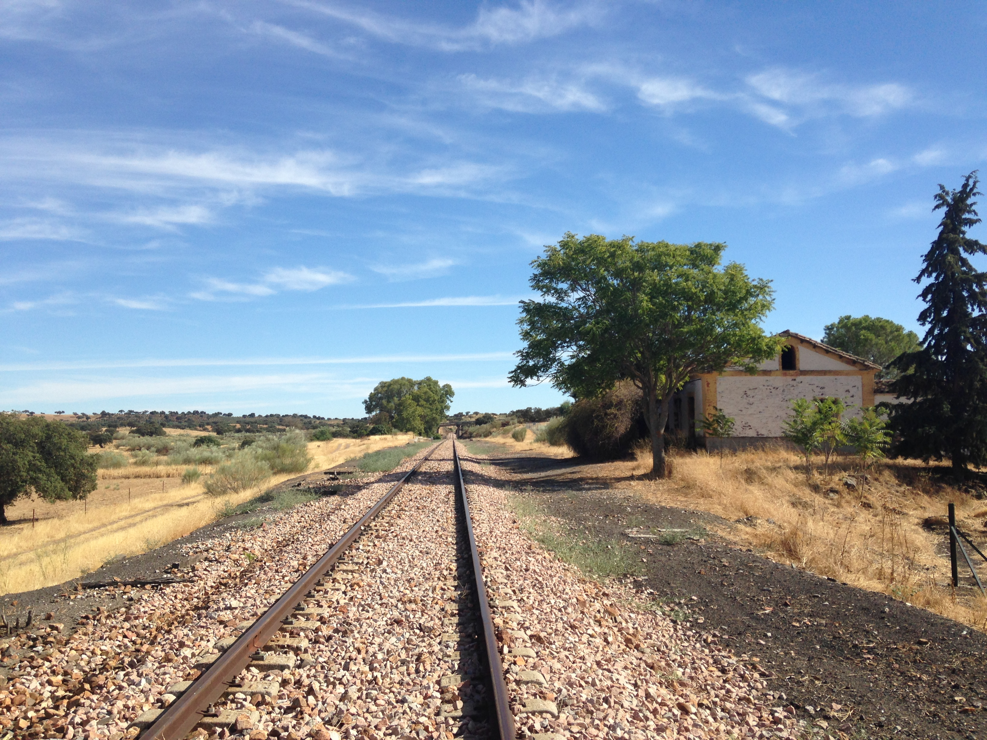 Estación de Zújar de Córdoba